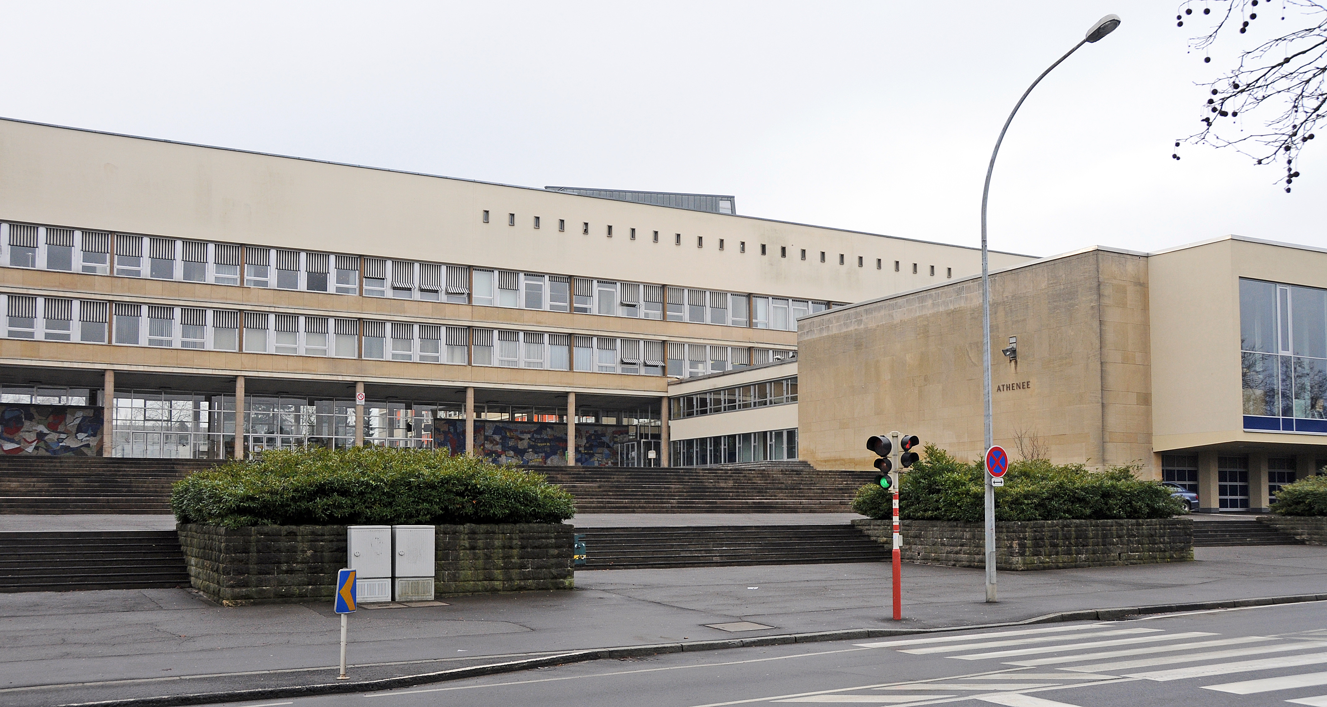 Stater Kolléisch